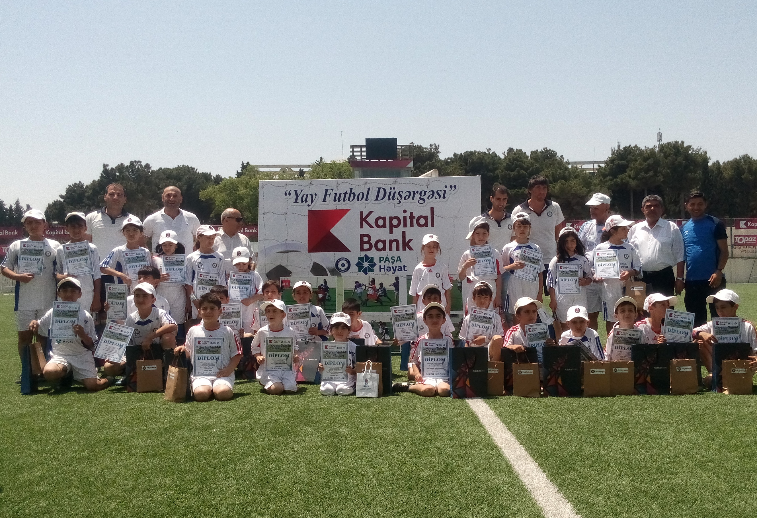 "Kapital Bank" ASC, "Paşa Həyat Sığorta" ASC-nin sponsorluğu, Təhsil Nazirliyi, Sumqayıt Şəhər İcra Hakimiyyəti, Sumqayıt Şəhər Təhsil Şöbəsi, "Azərikimya" İstehsalat Birliyi və "Sumqayıt" Futbol Klubunun təşkilatçılığı ilə Sumqayıt məktəbliləri üçün keçirilən "Yay Futbol Düşərgəsi"